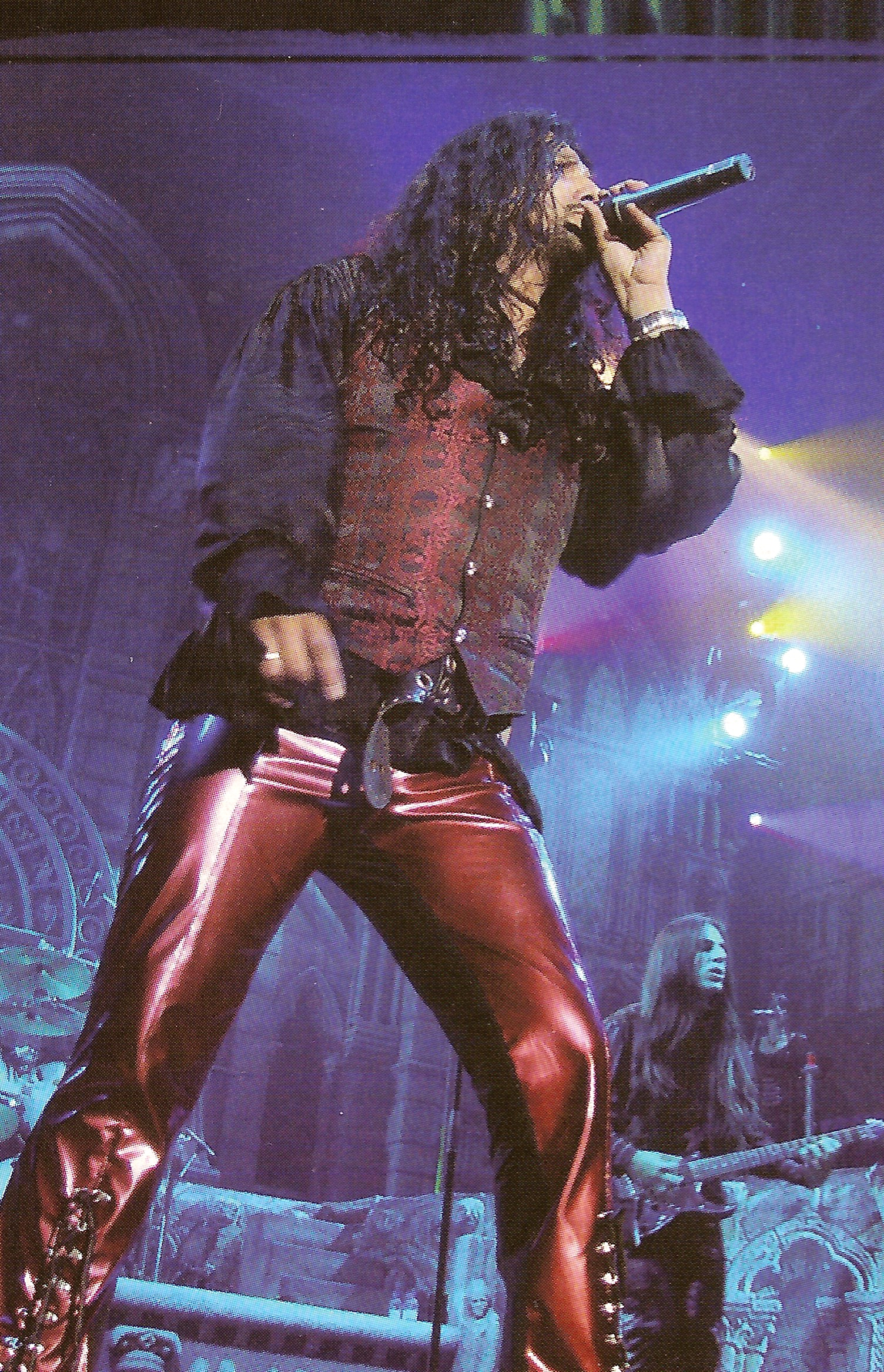 Esta foto la hize yo mismo durante el concierto de Mägo de Oz en Albacete el 15/07/2006, no posee ninguna licencia que impida su difusión. This photo was done by me during Mägo de Oz's concert in Albacete 15th July 2006. It has'nt got no copyright.